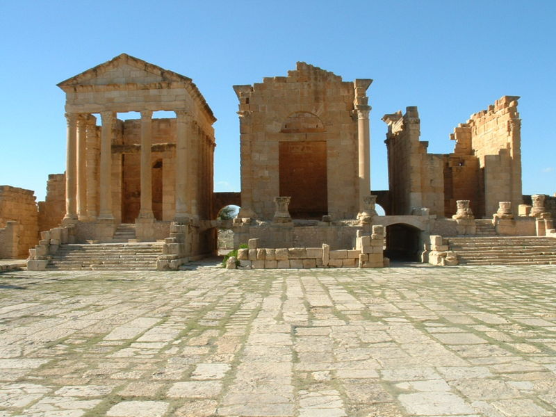 Photographie personnelle prise sur le site de Sbeïtla (Tunisie). Il est exceptionnel que ce capitole soit séparé en trois temples, voués à Minerve, Jupiter et Junon